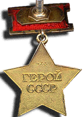 Золотая Звезда Героя Советского Союза (реверс)